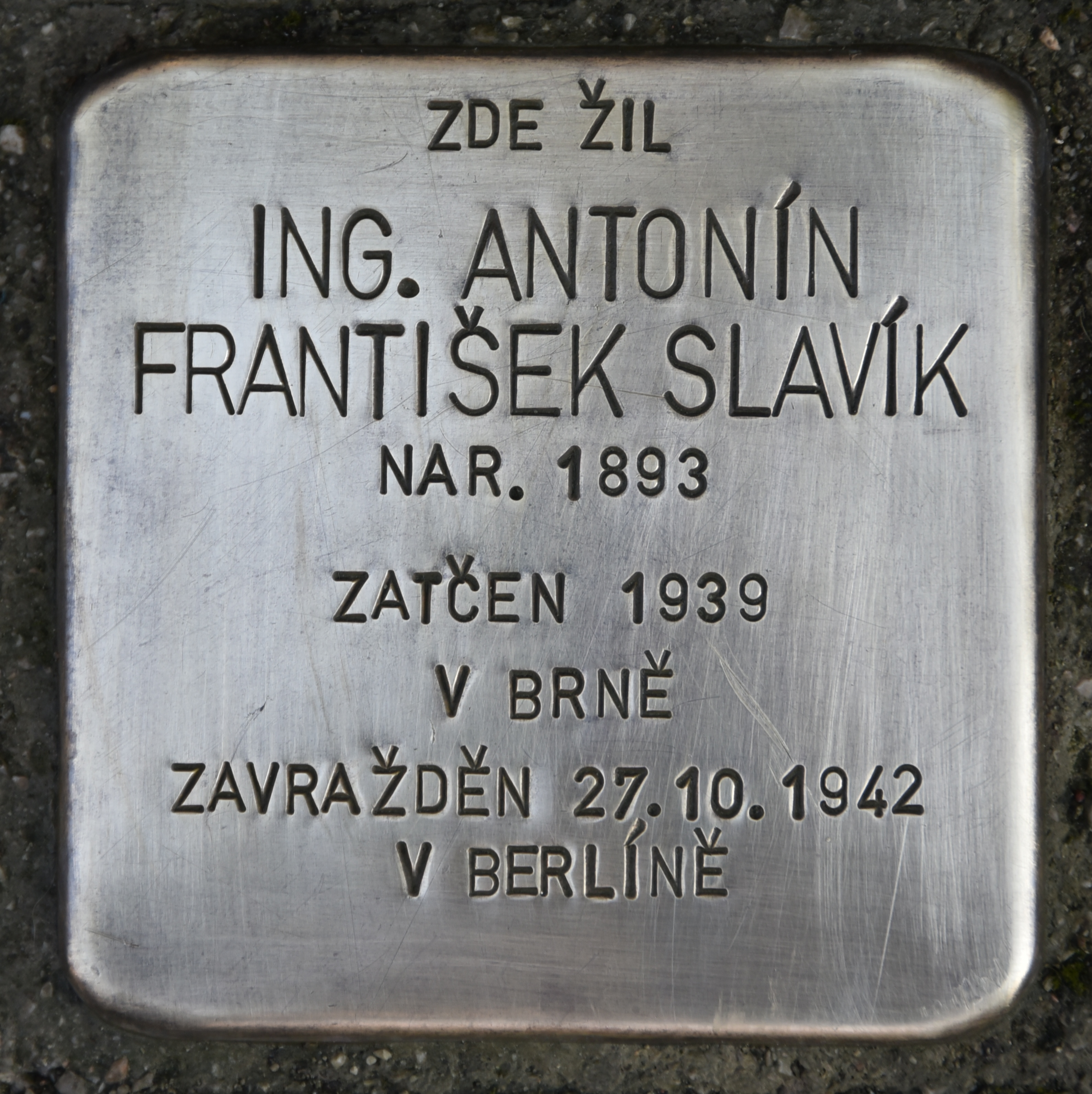 Stolperstein für Antonin Frantisek Slavik